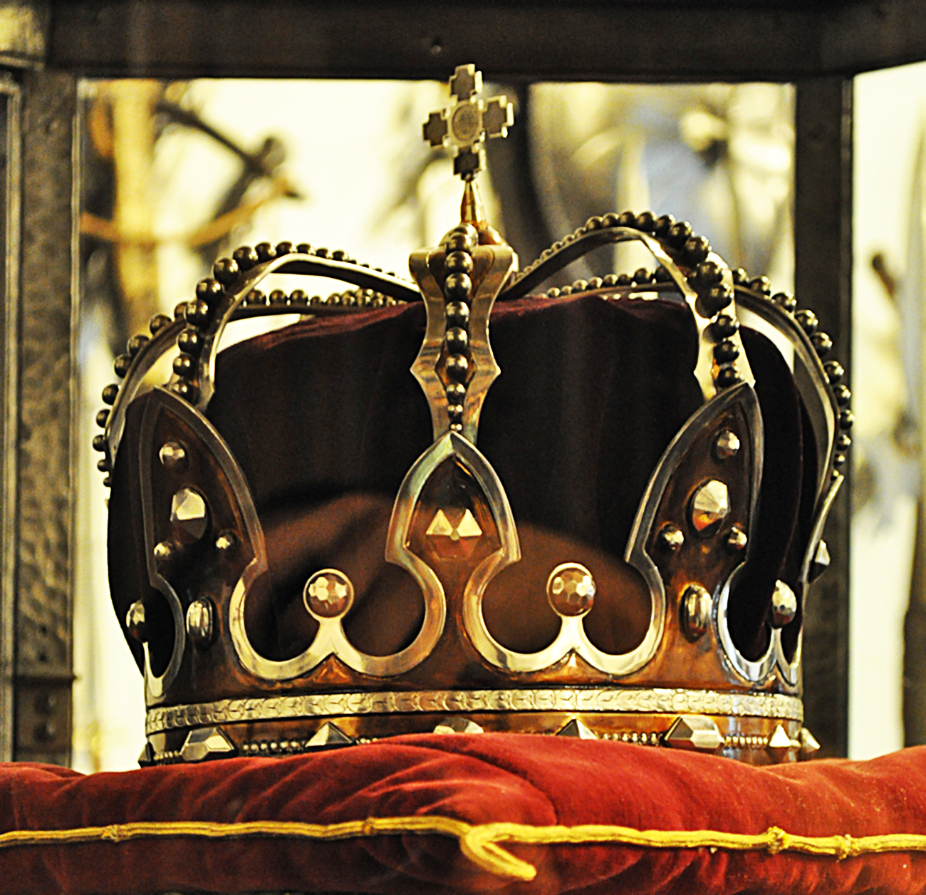 Coroana de aur a reginei Elisabeta a României. A fost confecționată în 1881 de către elevii și soldații meseriași ai Arsenalului Armatei din București, după o schiță făcută de Creator:Theodor Aman (1831-1891).